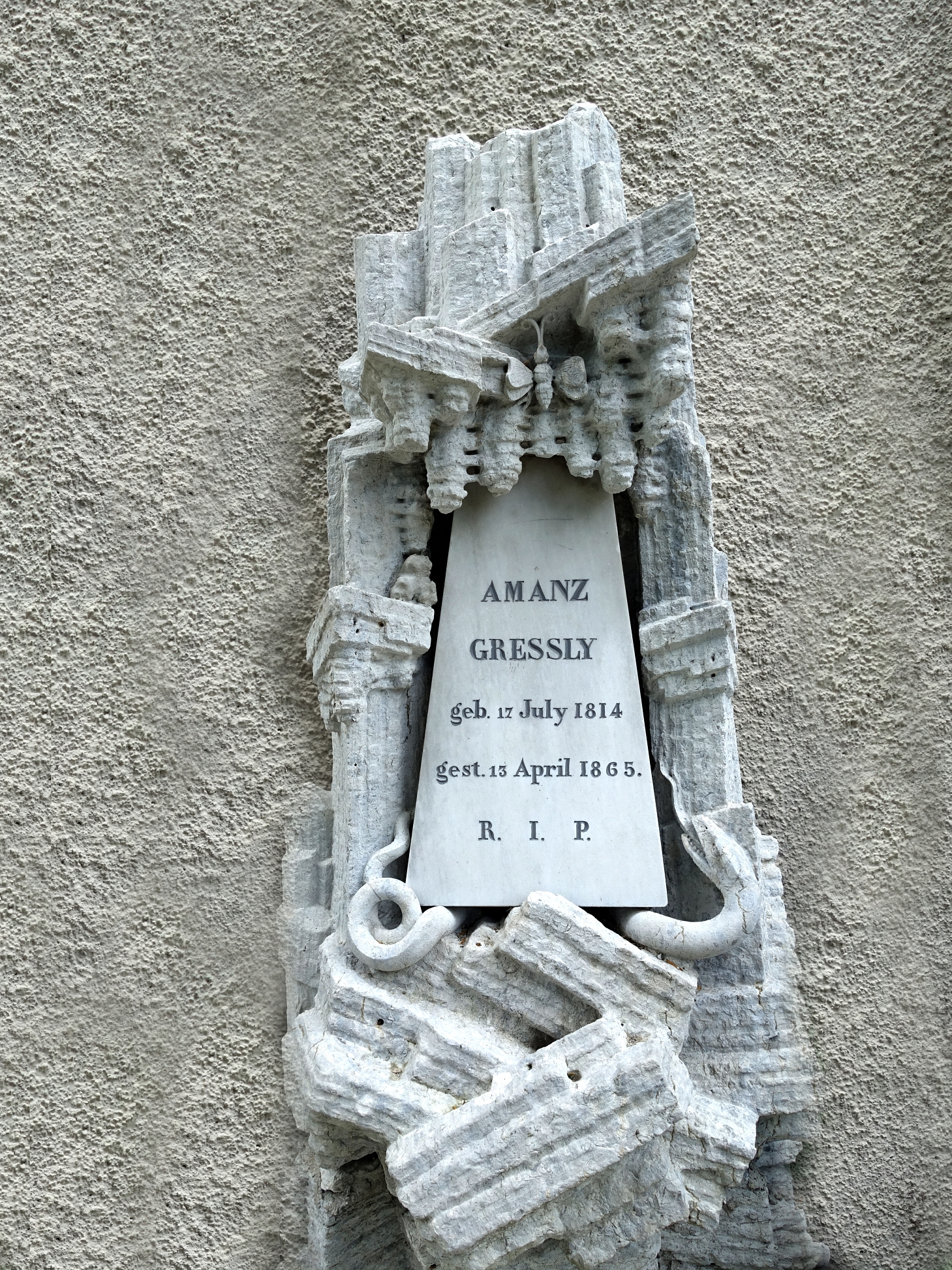 Amanz Grezssly (1814–1865) Geologe, Paläontologe. Grab. Kirche St. Niklaus, Friedhof Feldbrunnen-St. Niklaus, Solothurn.